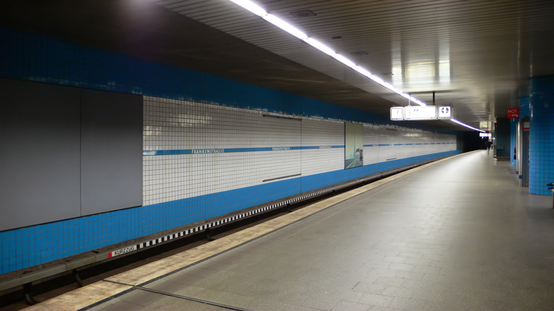 U-Bahnhof Frankenstraße der U-Bahn Nürnberg, Bahnsteigebene, Blick von Süden